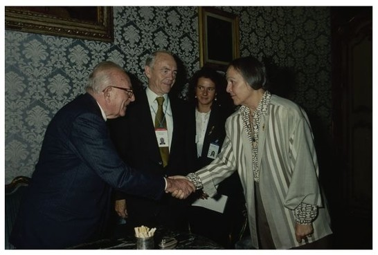 Il Presidente Della Camera dei Deputati Nilde Iotti incontra personalità dell'Assemblea NATO